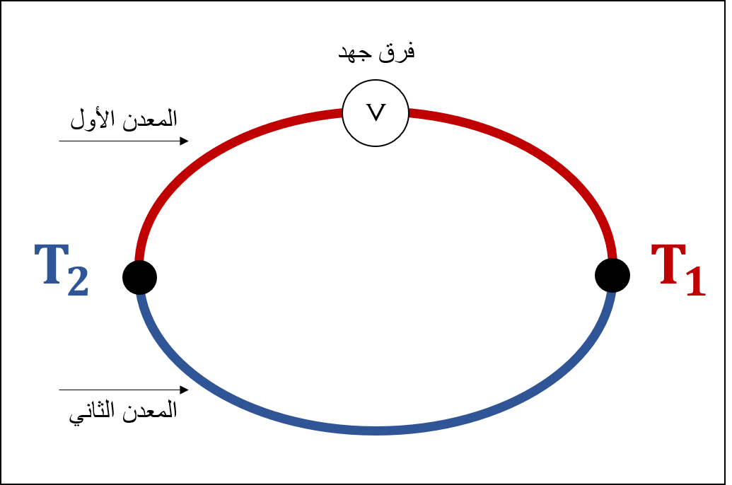 دائرة مكونة من فلزينمعرضة لدرجات حرارة متباينة